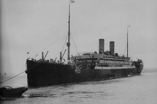 Der Postdampfer BARBAROSSA des NDL